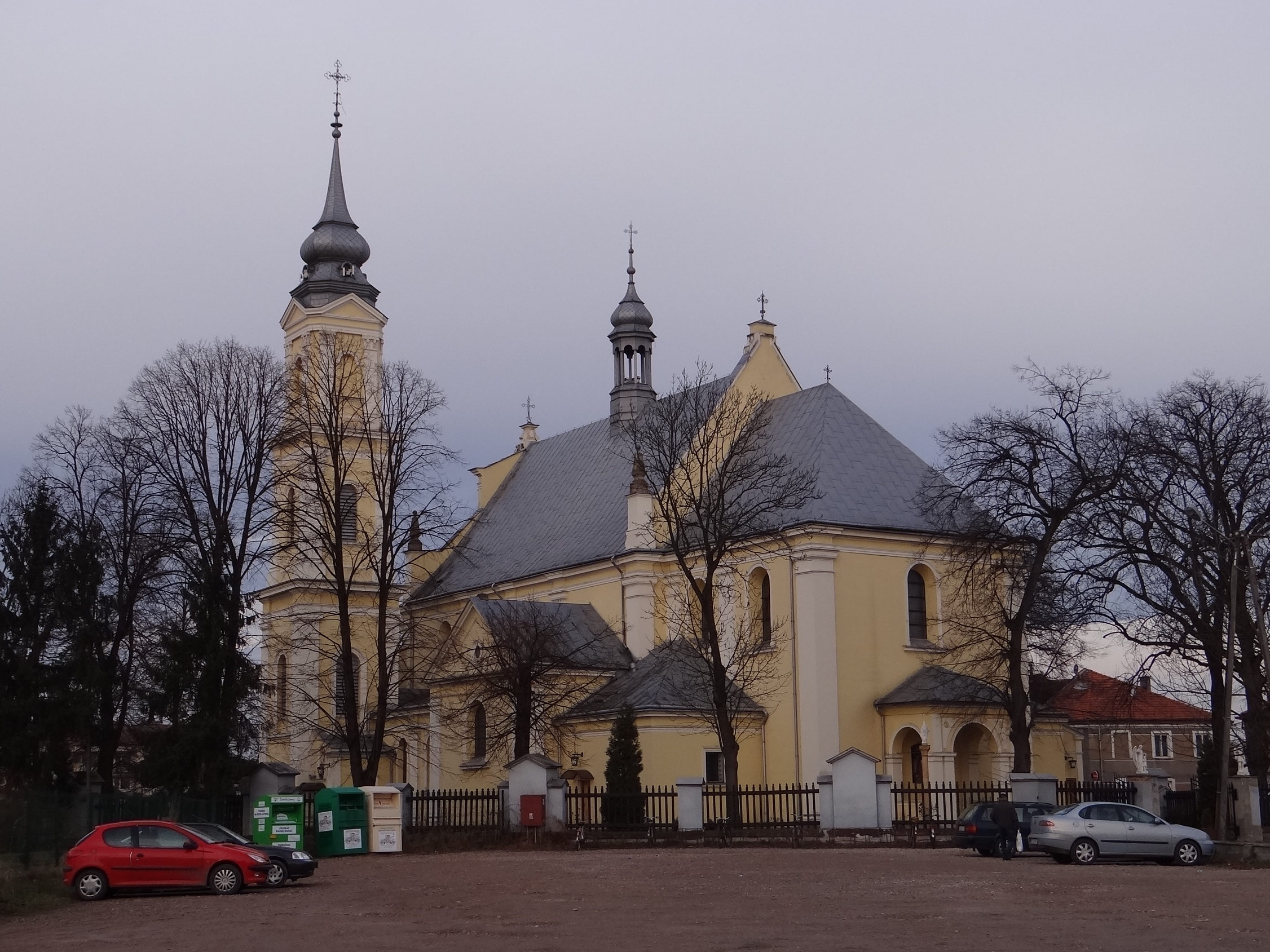 Szczucin Rynek 19 - rzymskokatolicki kościół parafialny p.w. św. Marii Magdaleny, 1680, XIX